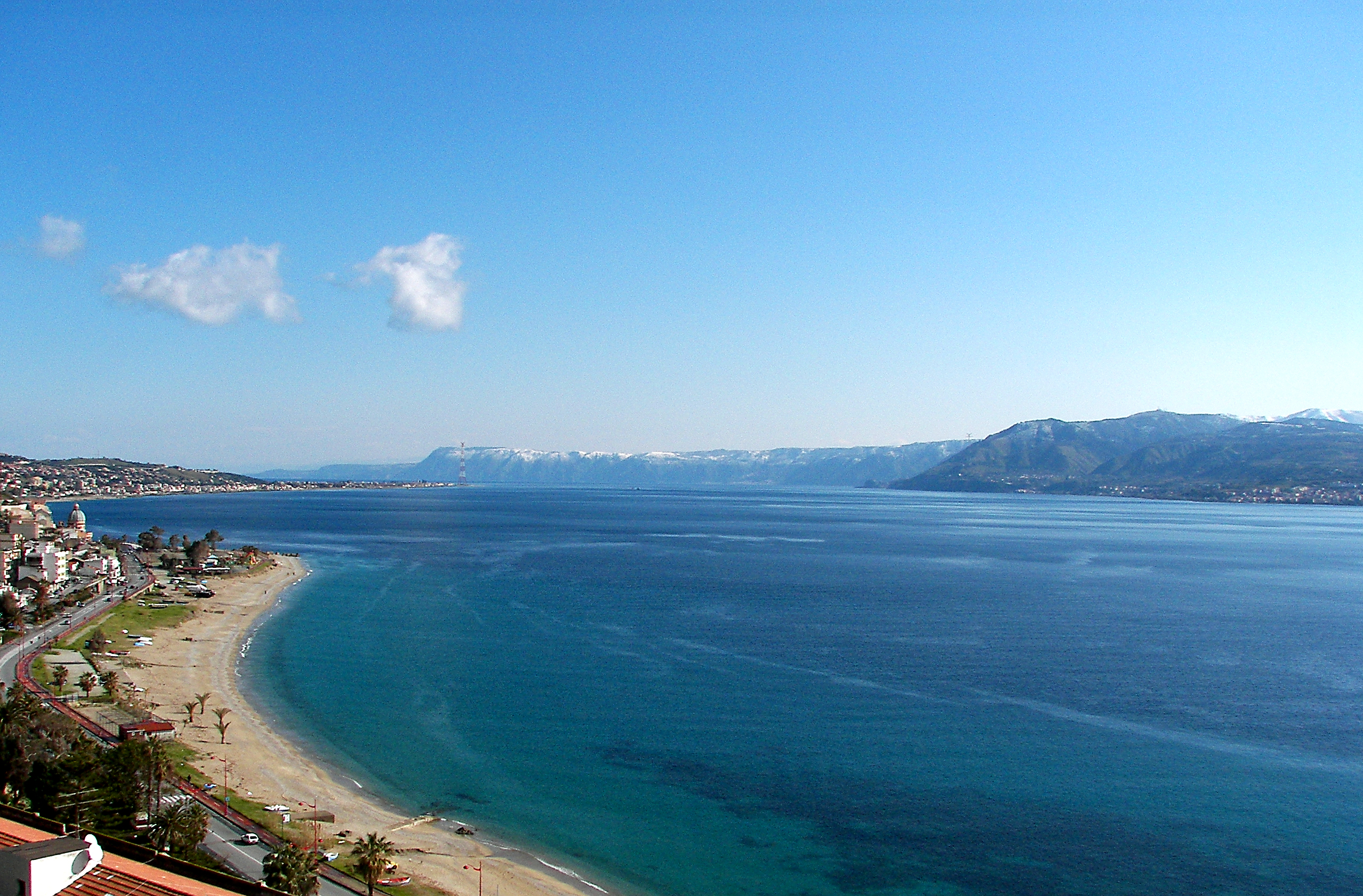 Il meraviglioso stretto di Messina, foto scattata dalla panoramica.